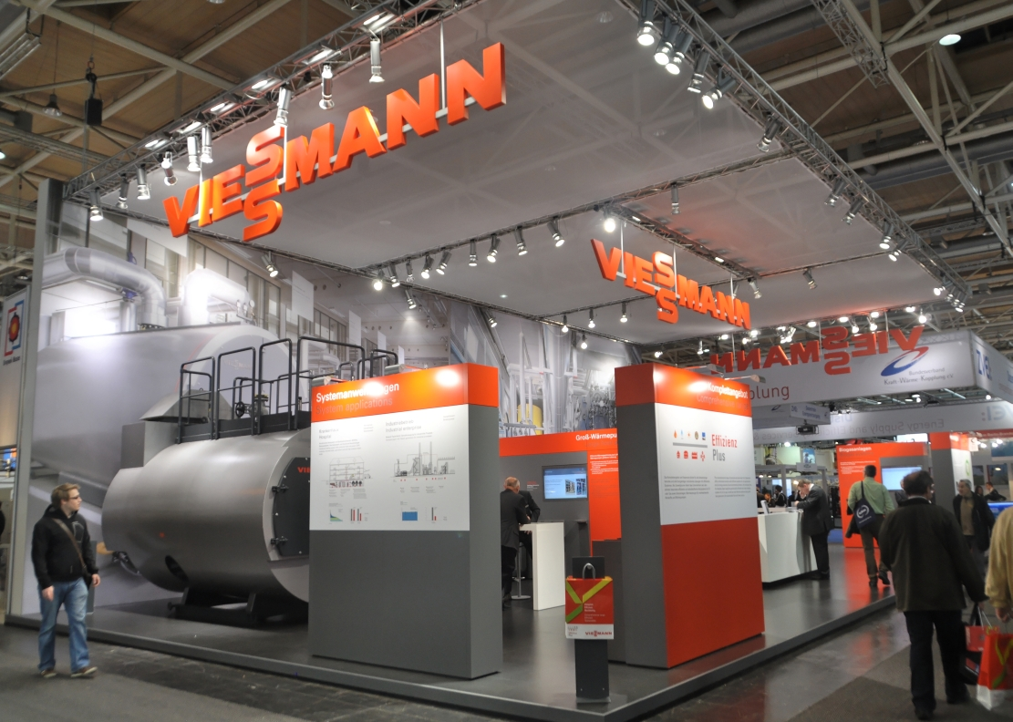 Hannover-Messe April 2012 Dieses Foto entstand durch die Mithilfe des gemeinnützigen Vereins Skillshare bei der Akkreditierung als Fotograf. Infos unter skillshare.eu Skillshare e.V. ist ein eingetragener gemeinnütziger Verein zur Förderung der Bildung durch Unterstützung der Erstellung, Sammlung und Verbreitung so genannten freien Wissens. IBAN: DE16 8306 5408 0004 8850 66 BIC: GENODEF1SLR Bank: VR-Bank Altenburger Land